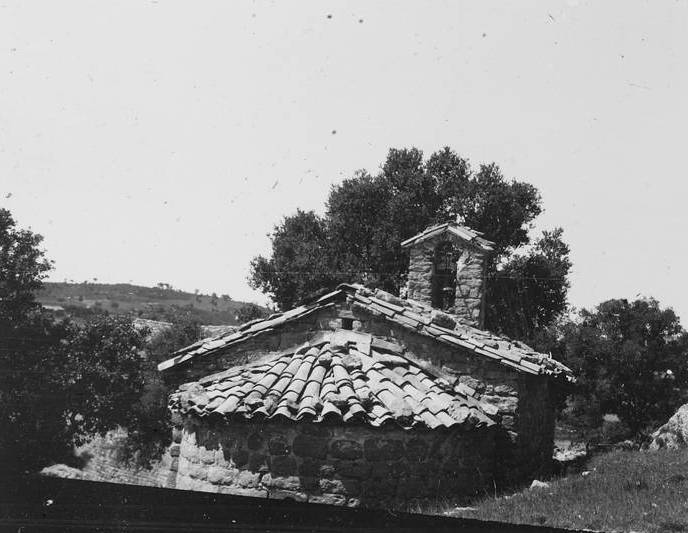 Església romànica de Santa Margarida del Mercadal. Josep Salvany i Blanch (1925)